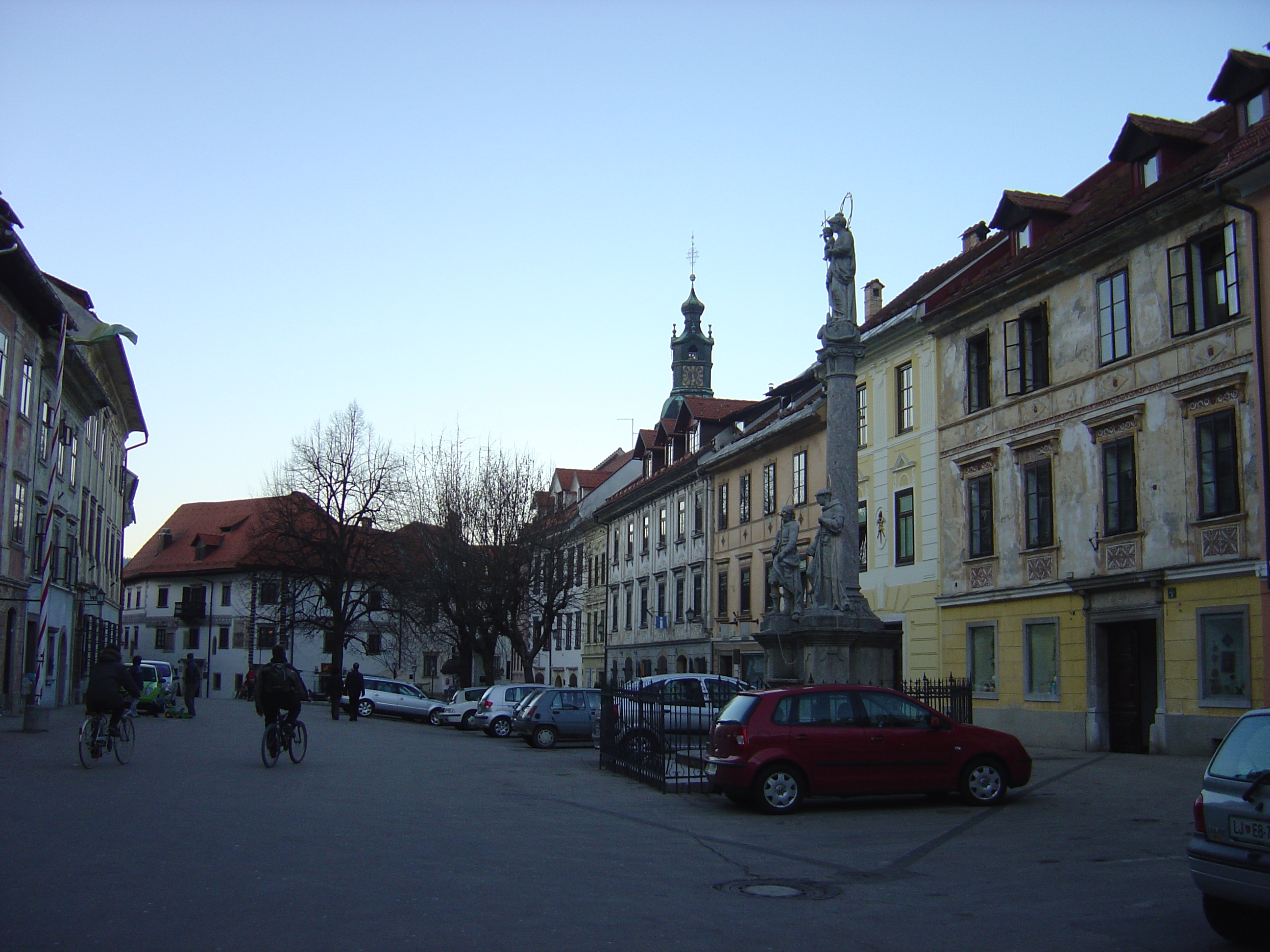 Škofja Loka, Slovenia